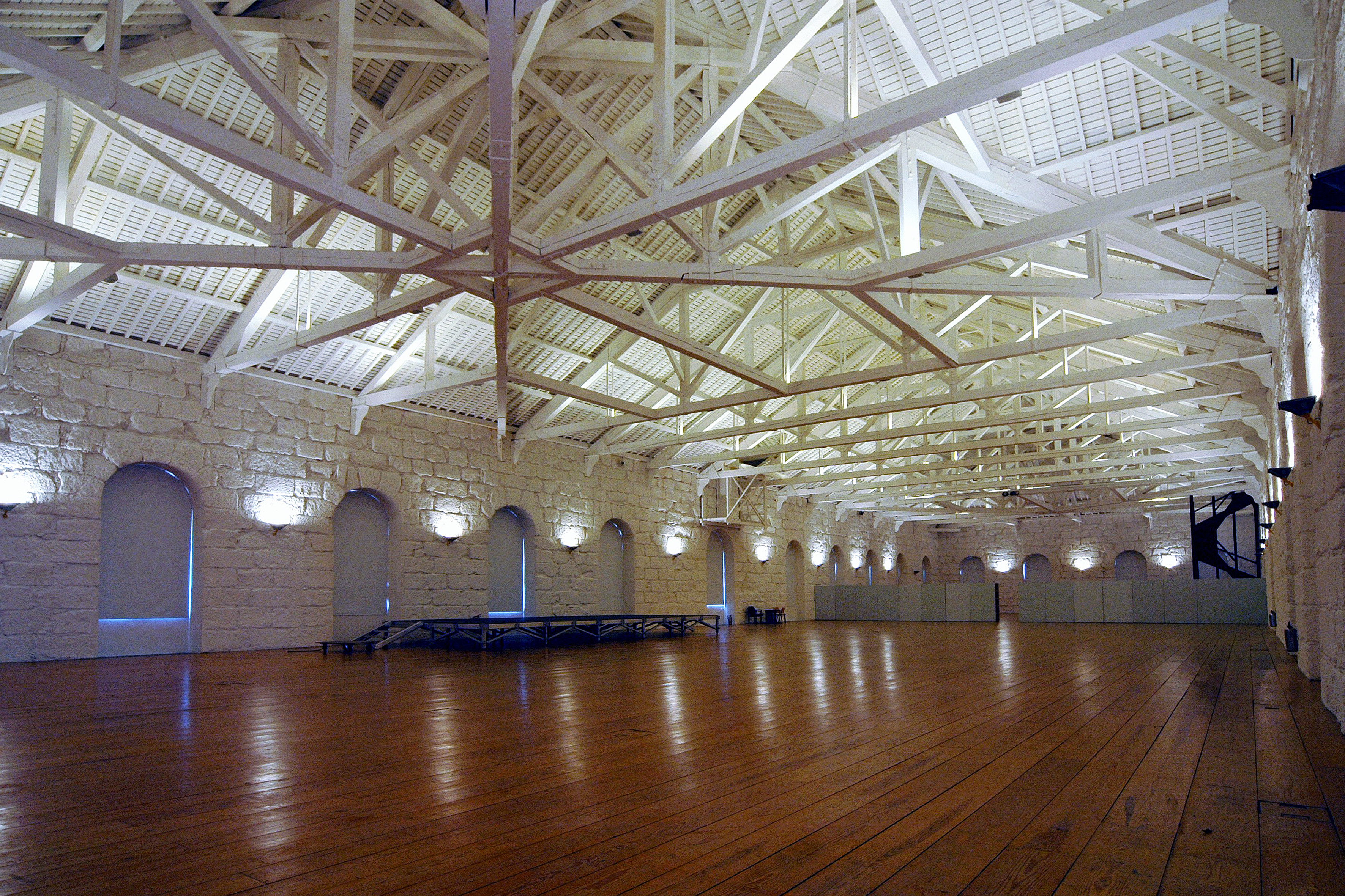 Alfândega Nova - Auditório - Salão Nobre This file was uploaded for Wiki Loves Monuments in Portugal with the unique identifier 70765.